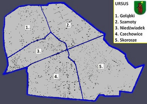 Podział Ursusa na osiedla